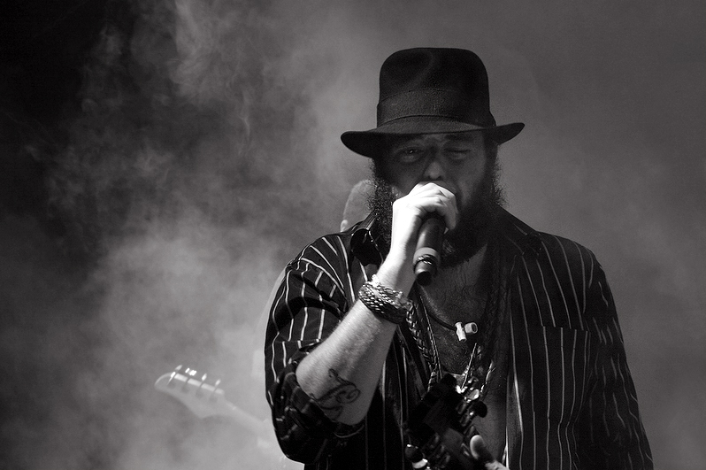 Kutxi Romero - Marea en Montevideo Rompiendo el Tango Tour 2007